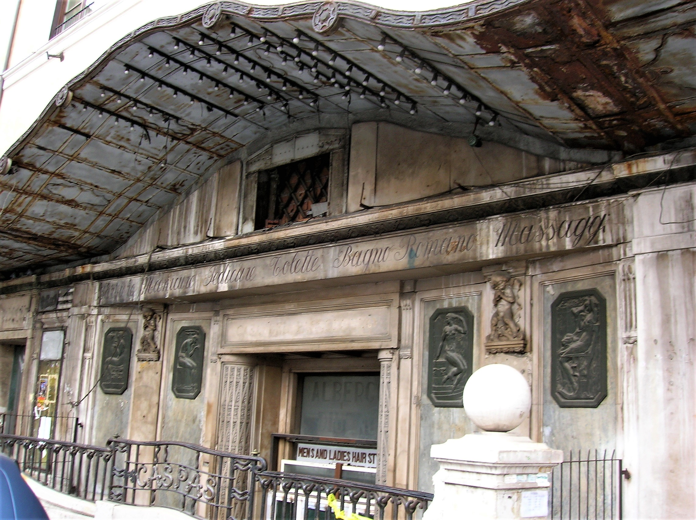 La casa del passeggero a Roma, nei pressi della Stazione Termini. [1][2][3][4]